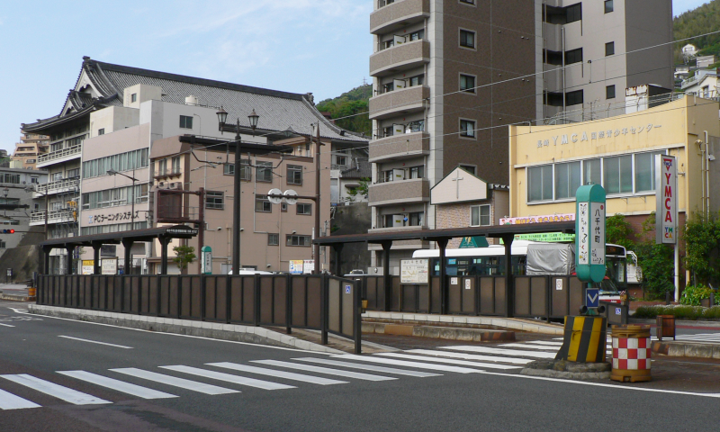 長崎電気軌道、八千代町電停